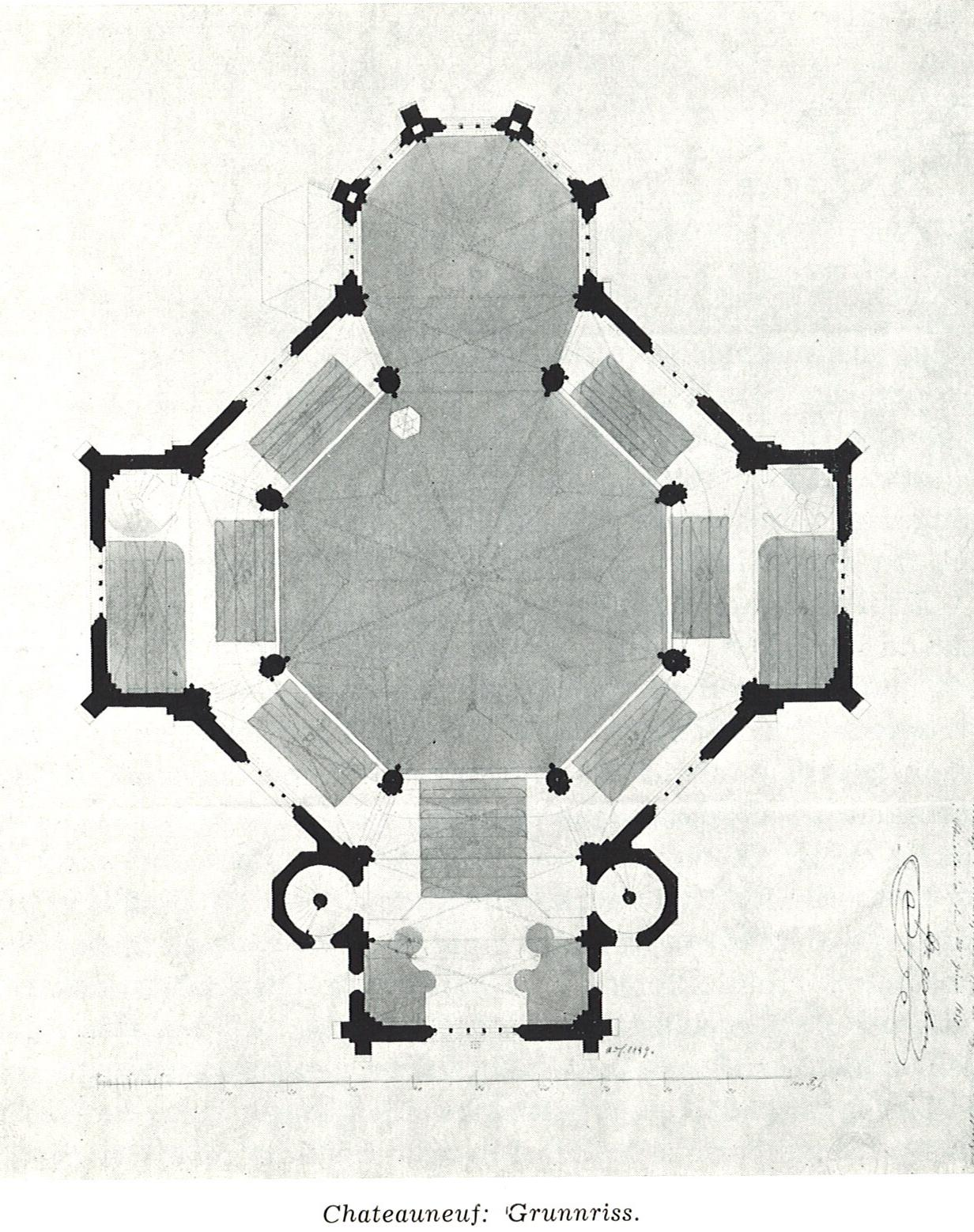 Chateauneuf-Grunnriss